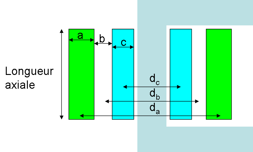 Schéma pour calculer la tension de court-circuit d'un transformateur